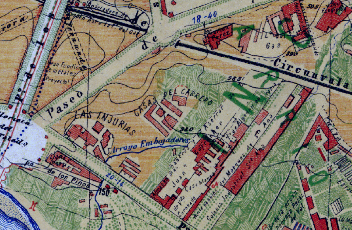 Detalle del barrio de Las Injurias en el plano de Facundo Cañada, de 1900.